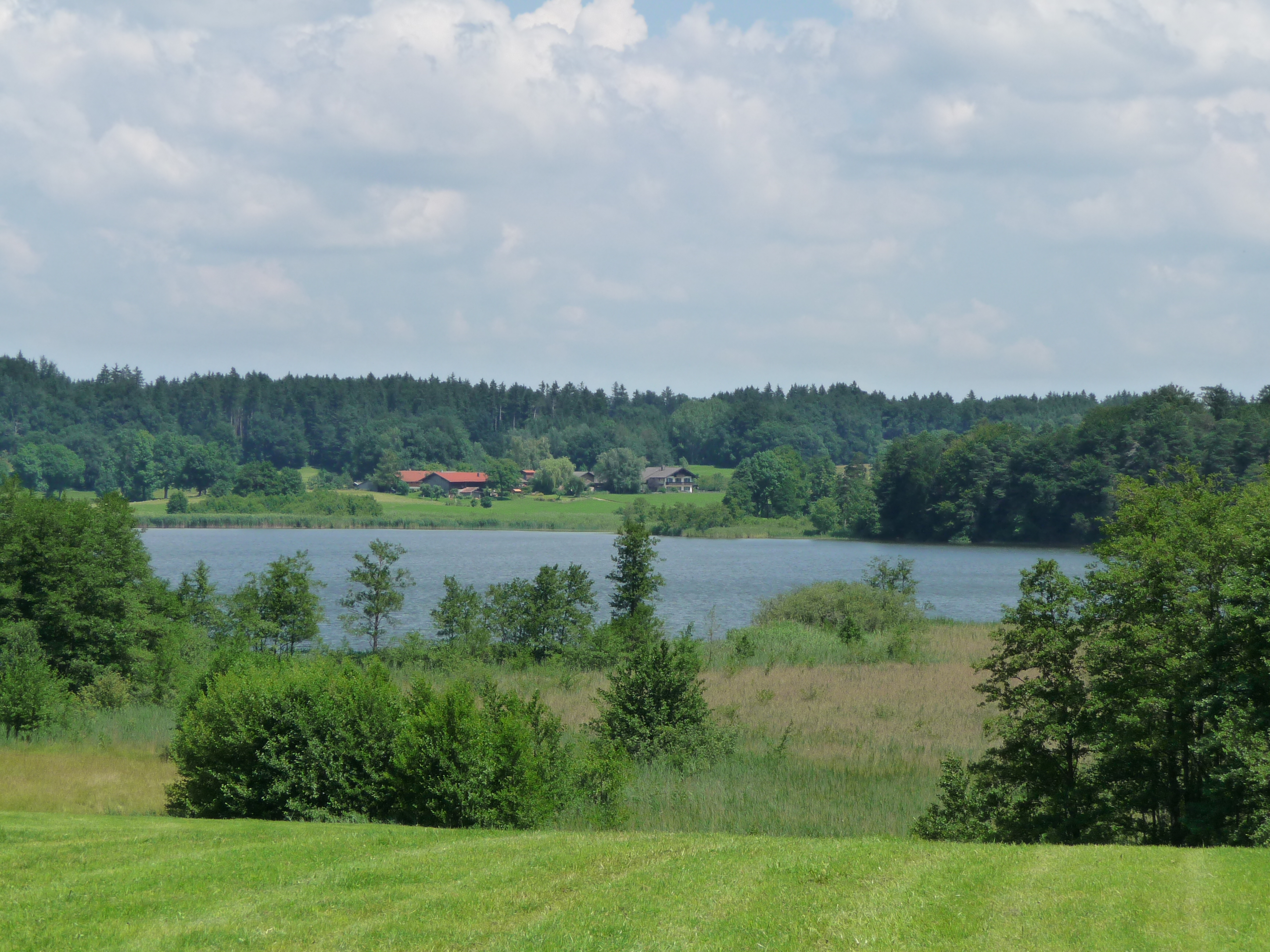 Eggstätt-Hemhofer-Seenplatte, Pelhamer See